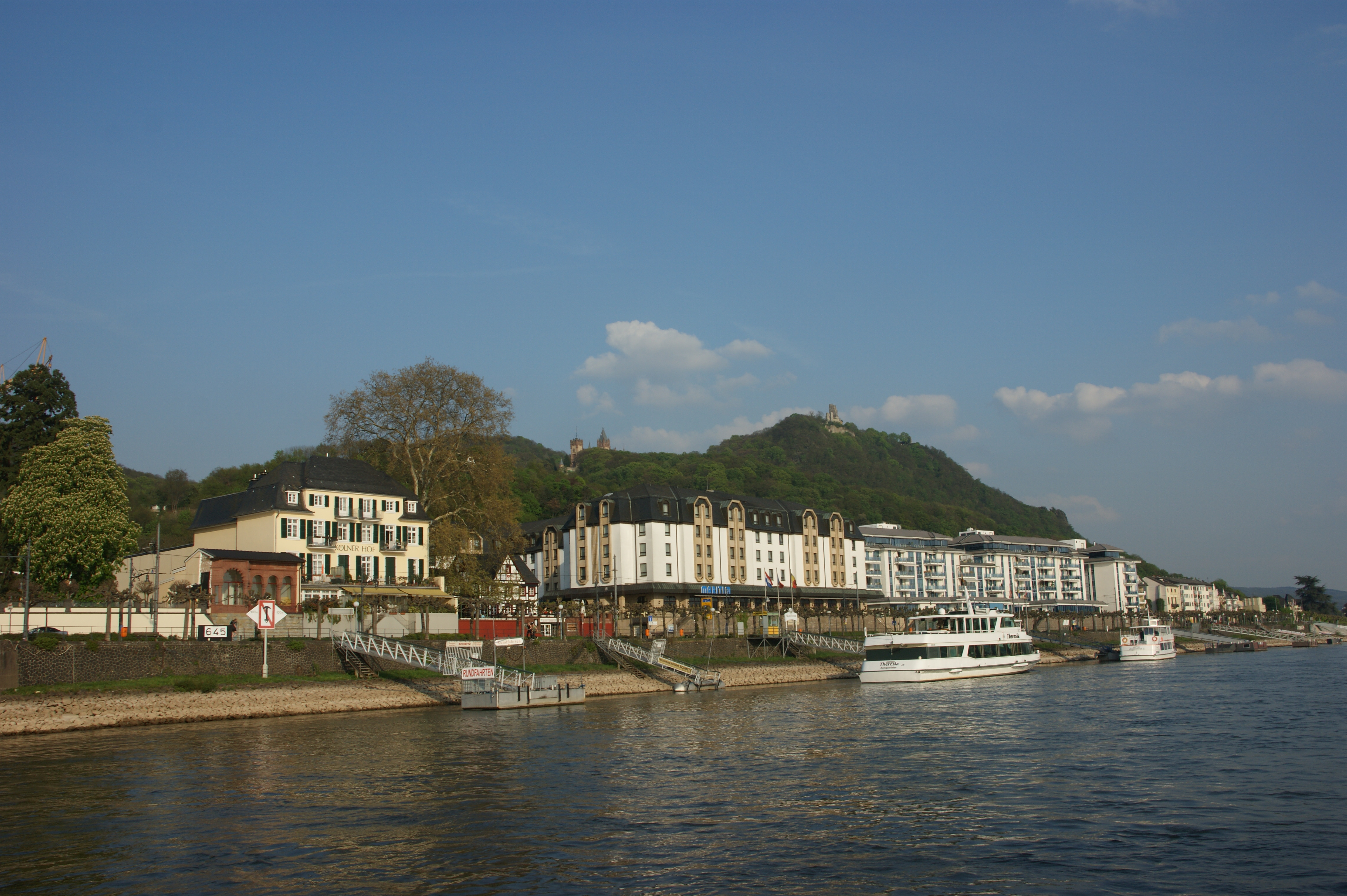 Altstadt Königswinter vom Rhein aus gesehen, Drachenfels im Hintergrund